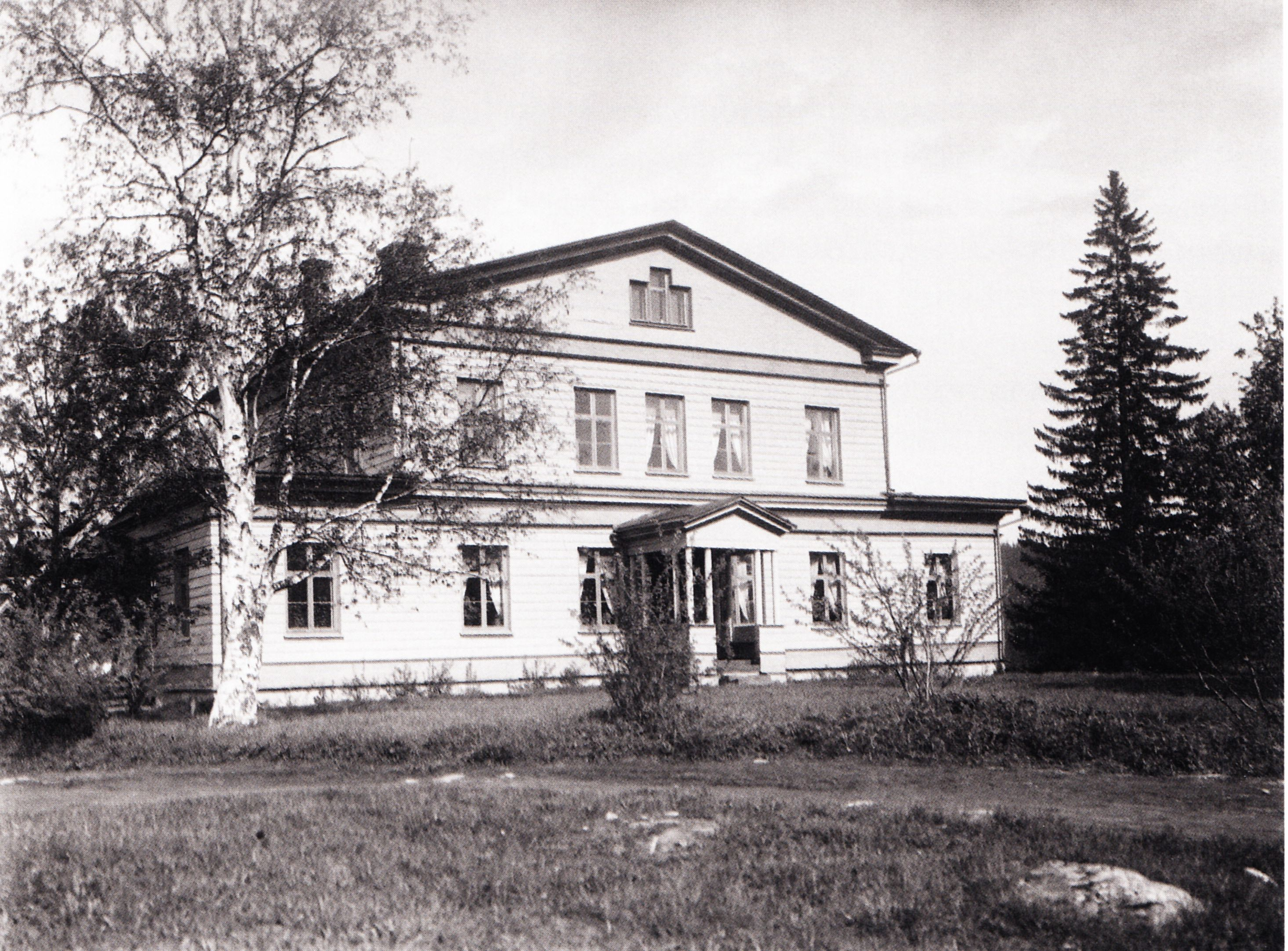 Haminalahden kartano